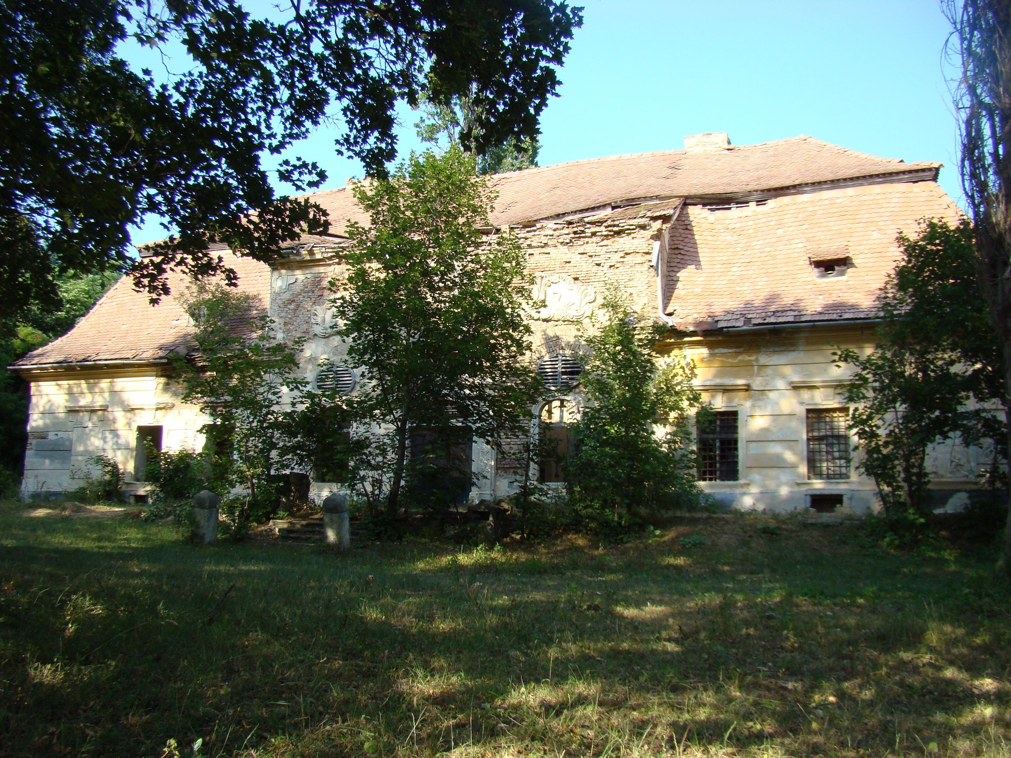 Castelul Teleki, sat COMLOD; comuna MILAŞ